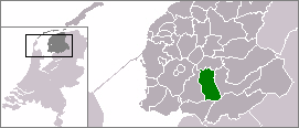 Self made map of the municipality of Haskerland in 1983.